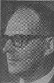 Arkitekten Erik Glud